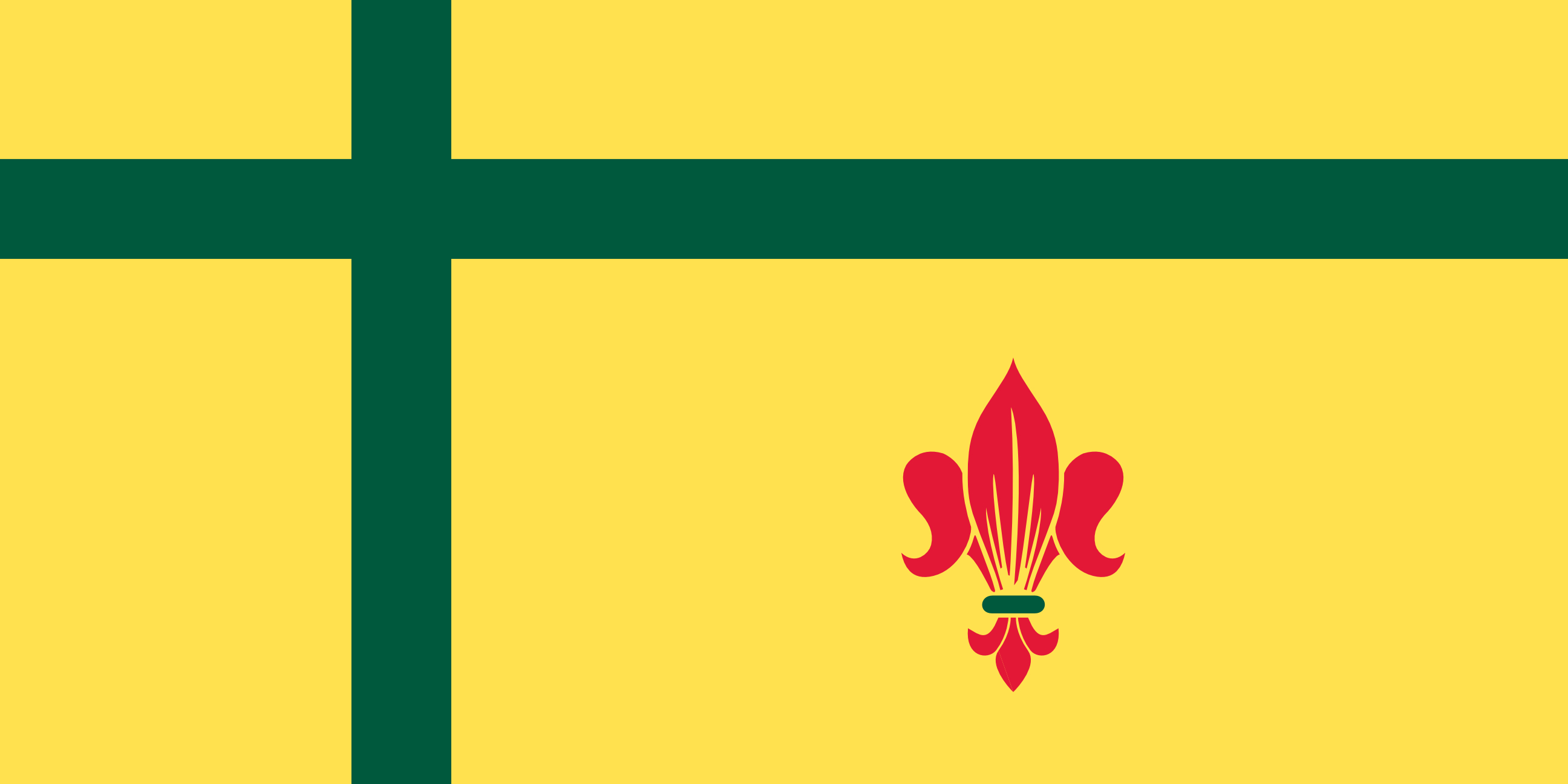 Drapeau des francophones de la province canadienne de la Saskatchewan.